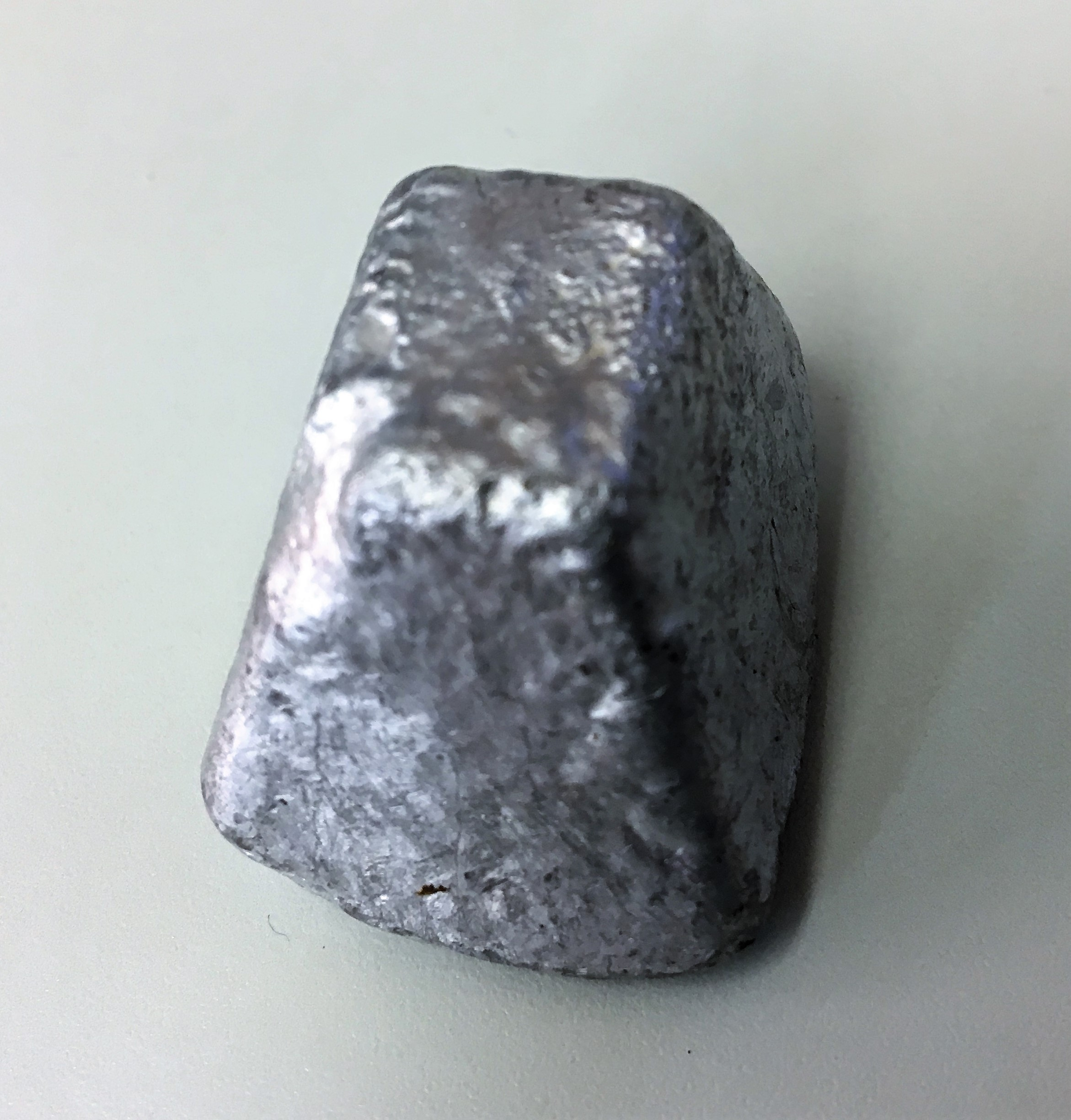 岡山県総社市下原の朝日アルミ産業で製造されていた製鉄用の脱酸素剤（粗アルミニウム）。